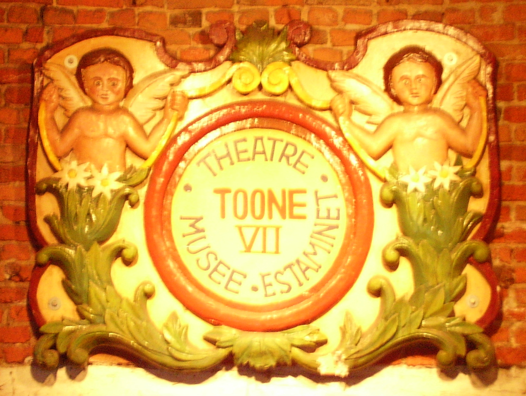 Description: Enseigne du Théâtre Royal de Toone (accès Marché aux herbes) - Bruxelles Author: User:Ben2 Date of creation: 09 juin 2006 Source: Photo personnelle